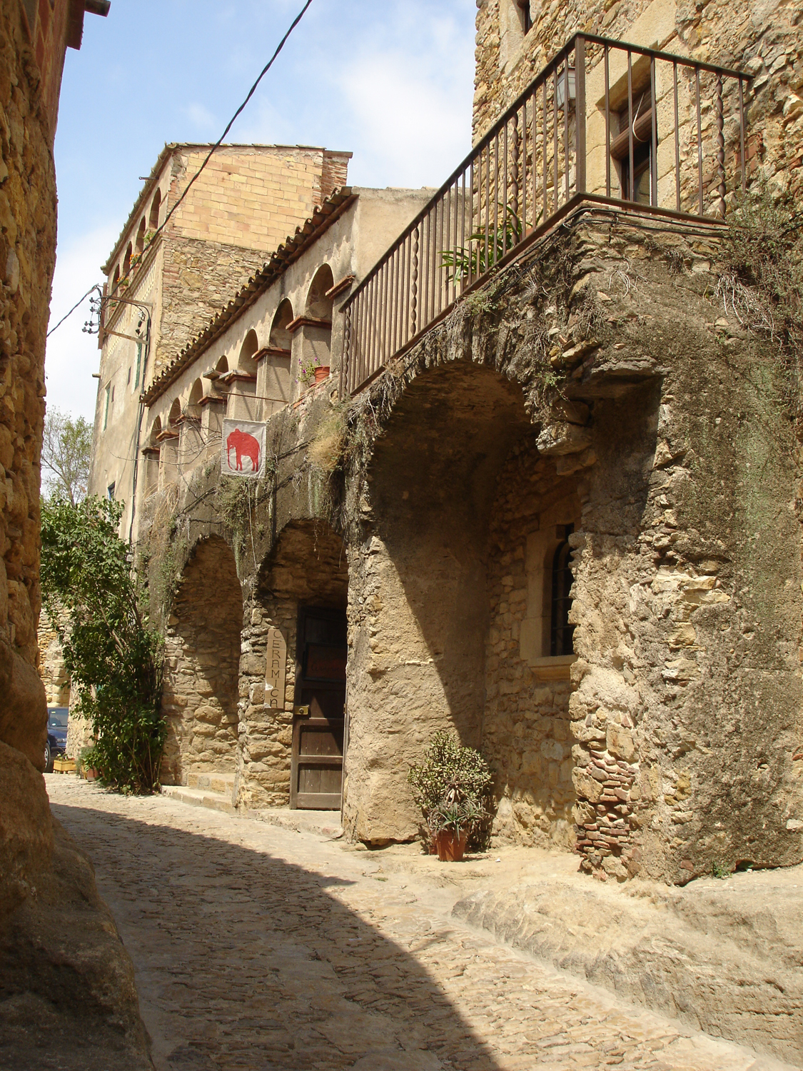 Peratallada (Girona, Catalunya, Espanya)